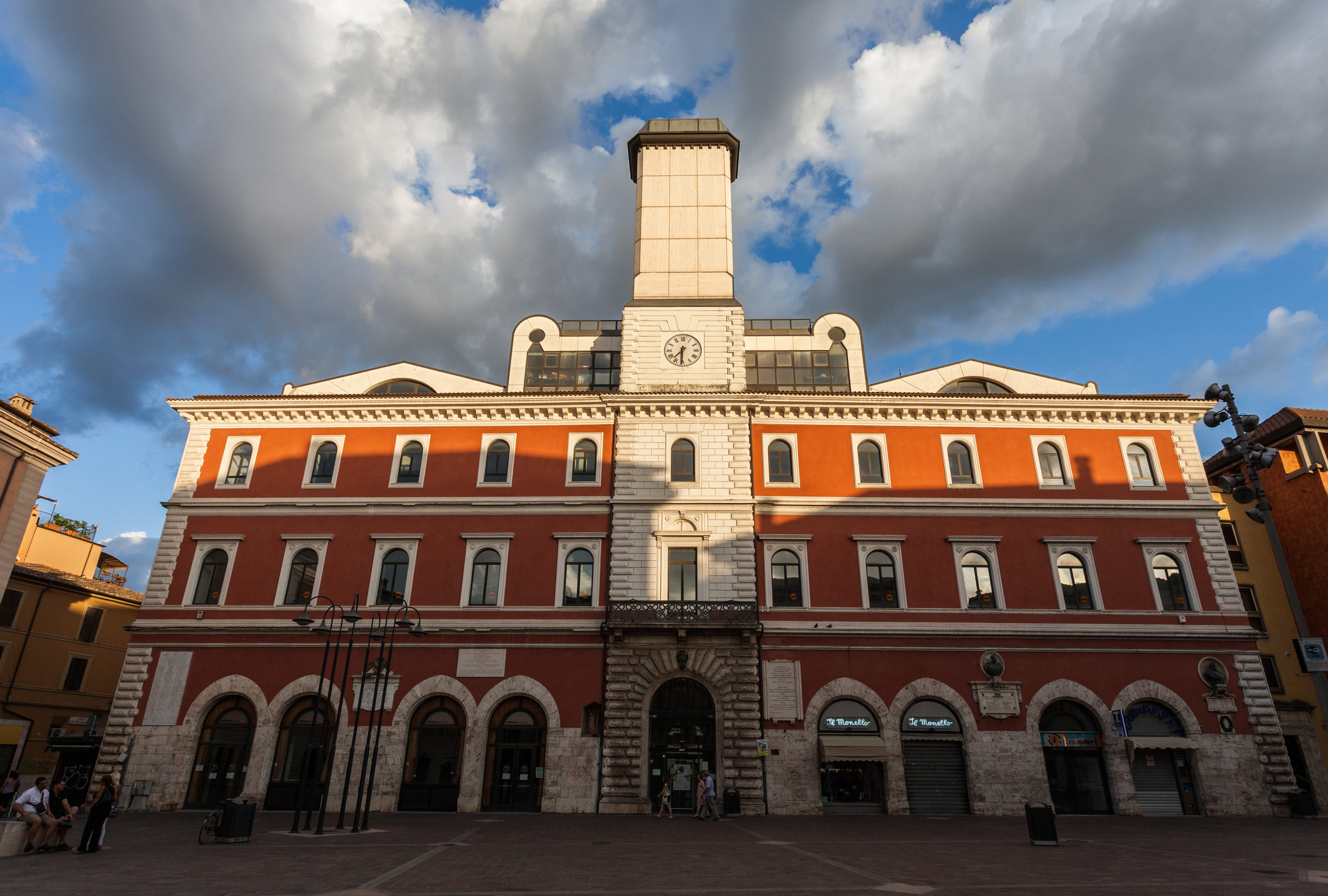 Palazzo bct - Biblioteca comunale di Terni This is a photo of a monument which is part of cultural heritage of Italy.